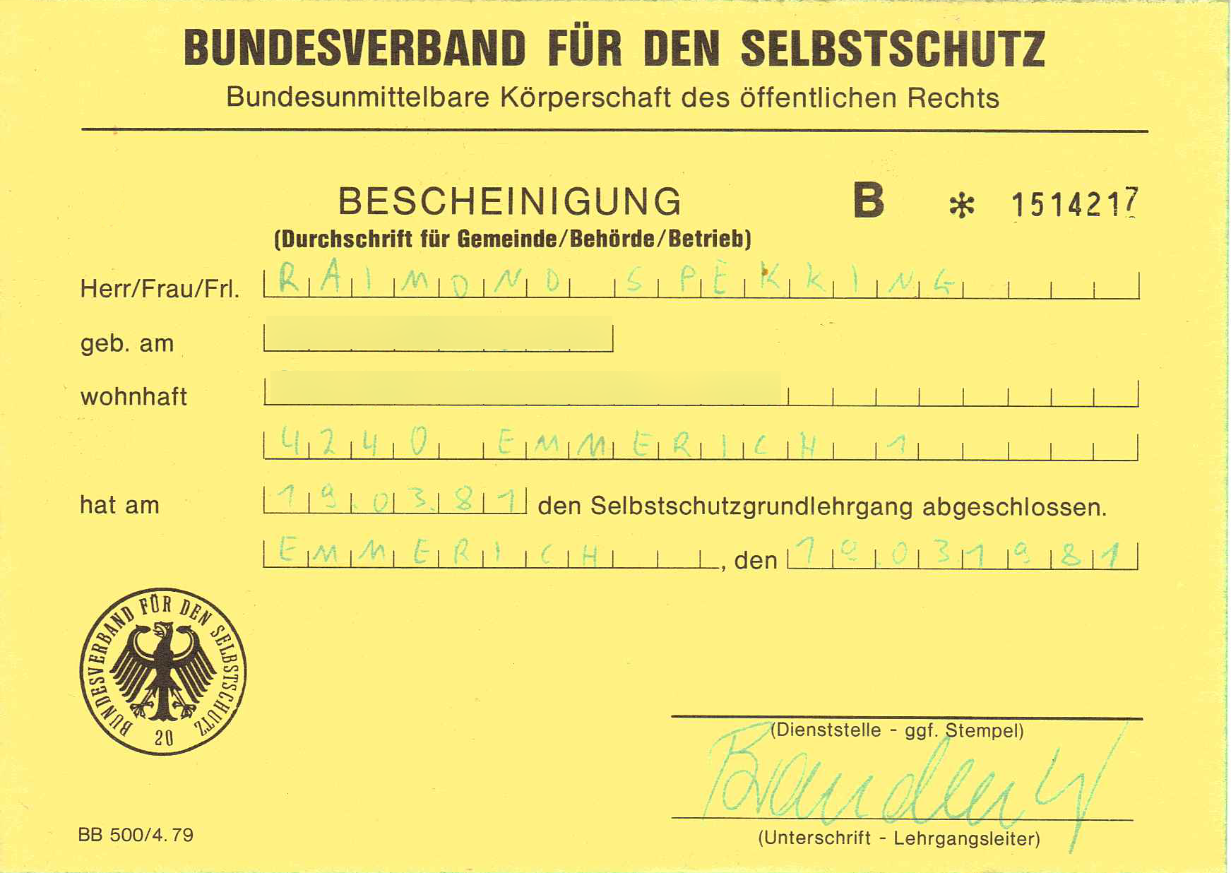 Meine Bescheinigung für Selbstschutzlehrgang, durchgeführt vom Bundesverband für den Selbstschutz, den ich 1981 im Rahmen des Schulunterrichtes auf einem Gymnasium in Emmerich absolviert habe